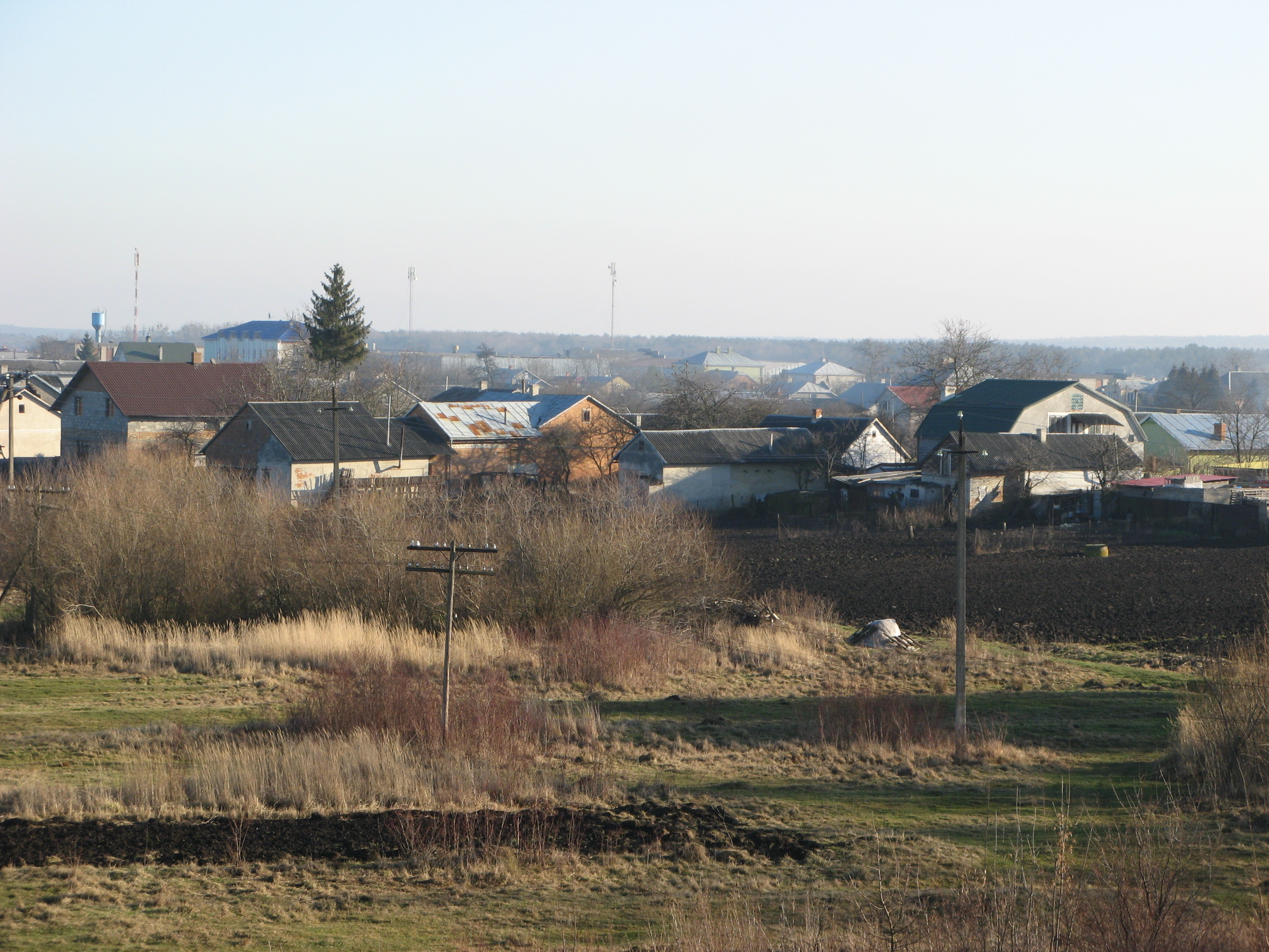 смт Запитів (Львівська обл.)